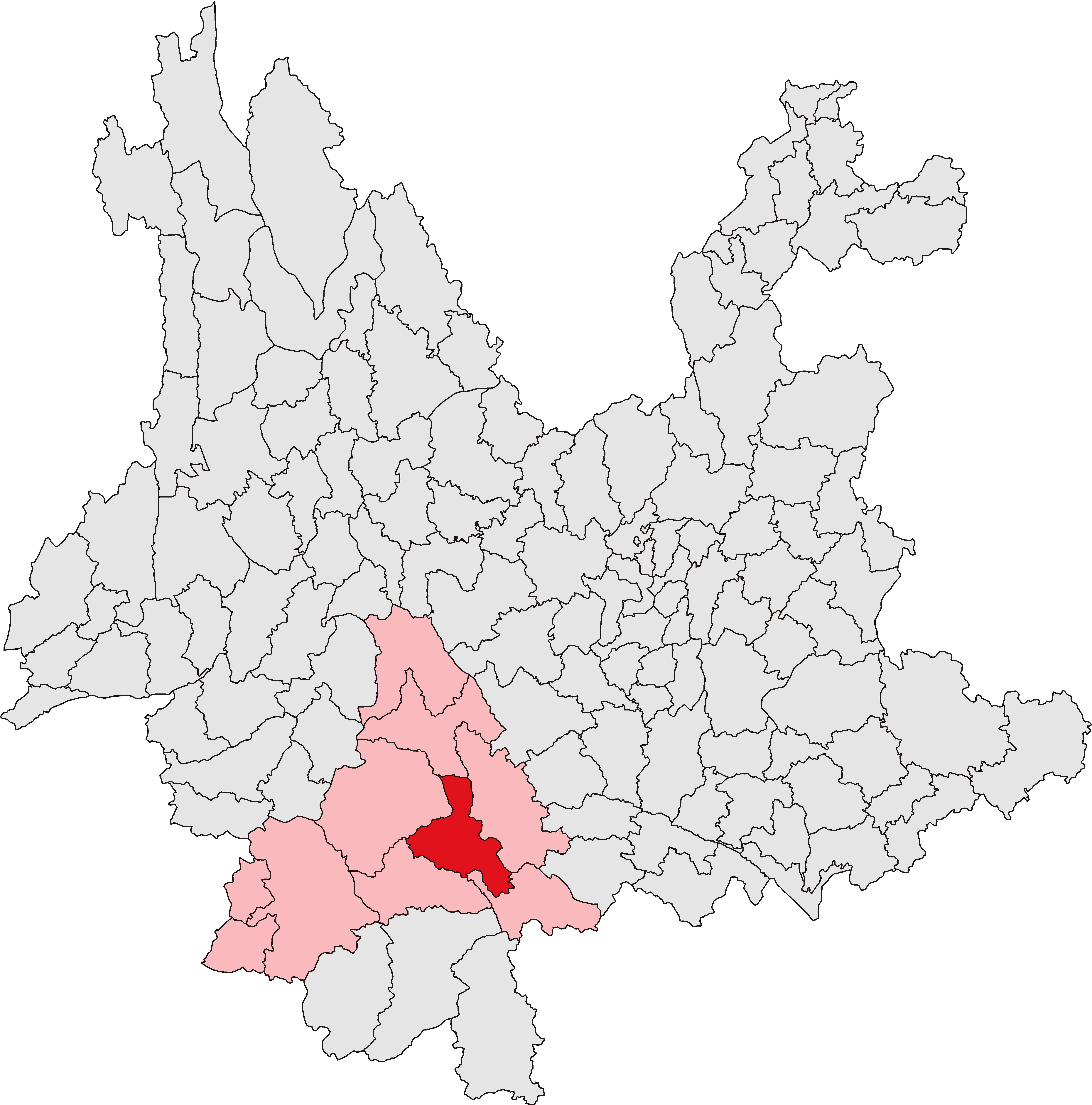 中文（中国大陆）: 宁洱哈尼族彝族自治县位置图